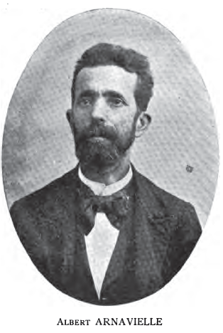 Albèrt Arnavièla